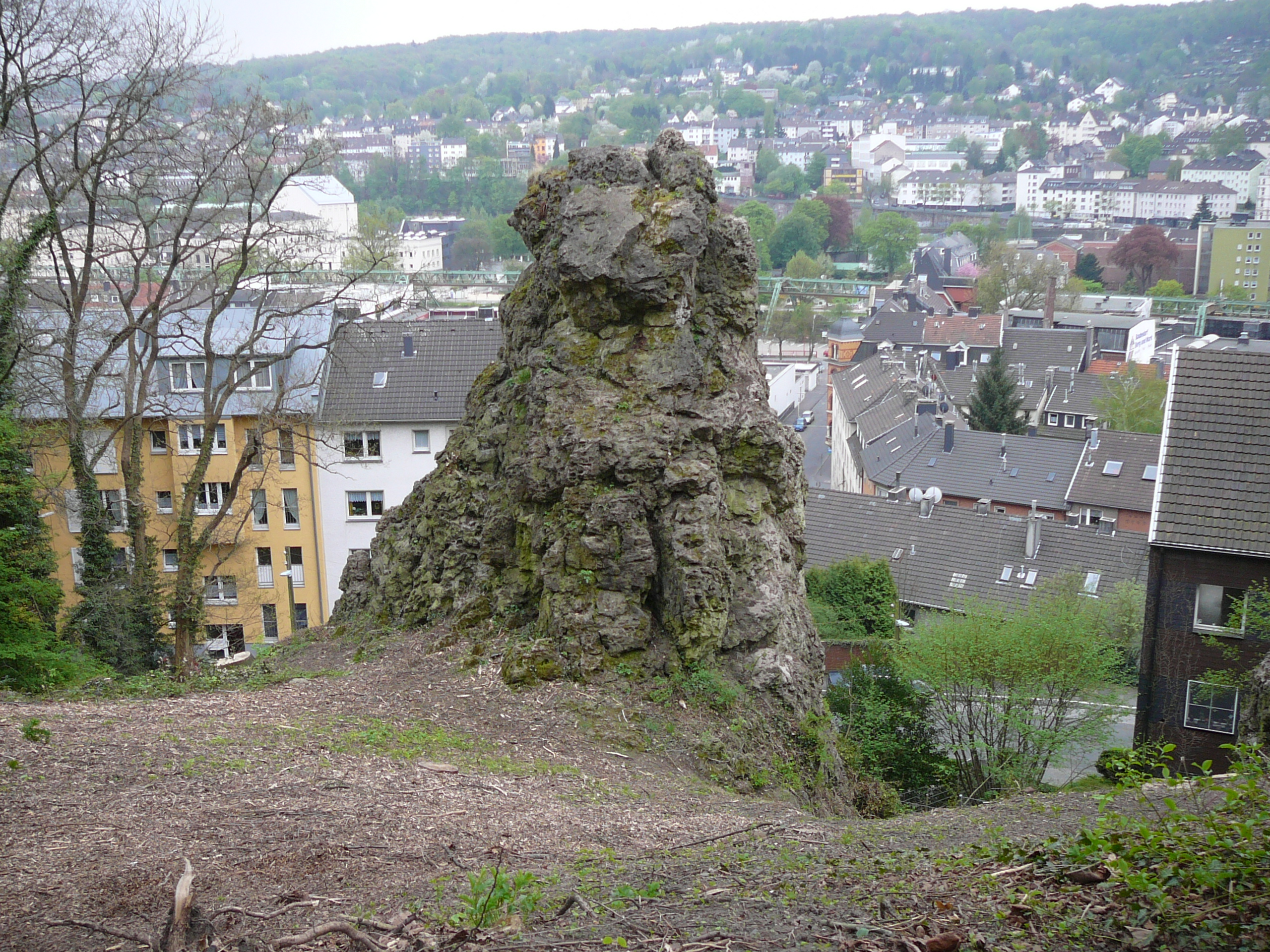 Tannenstraße, Wuppertal